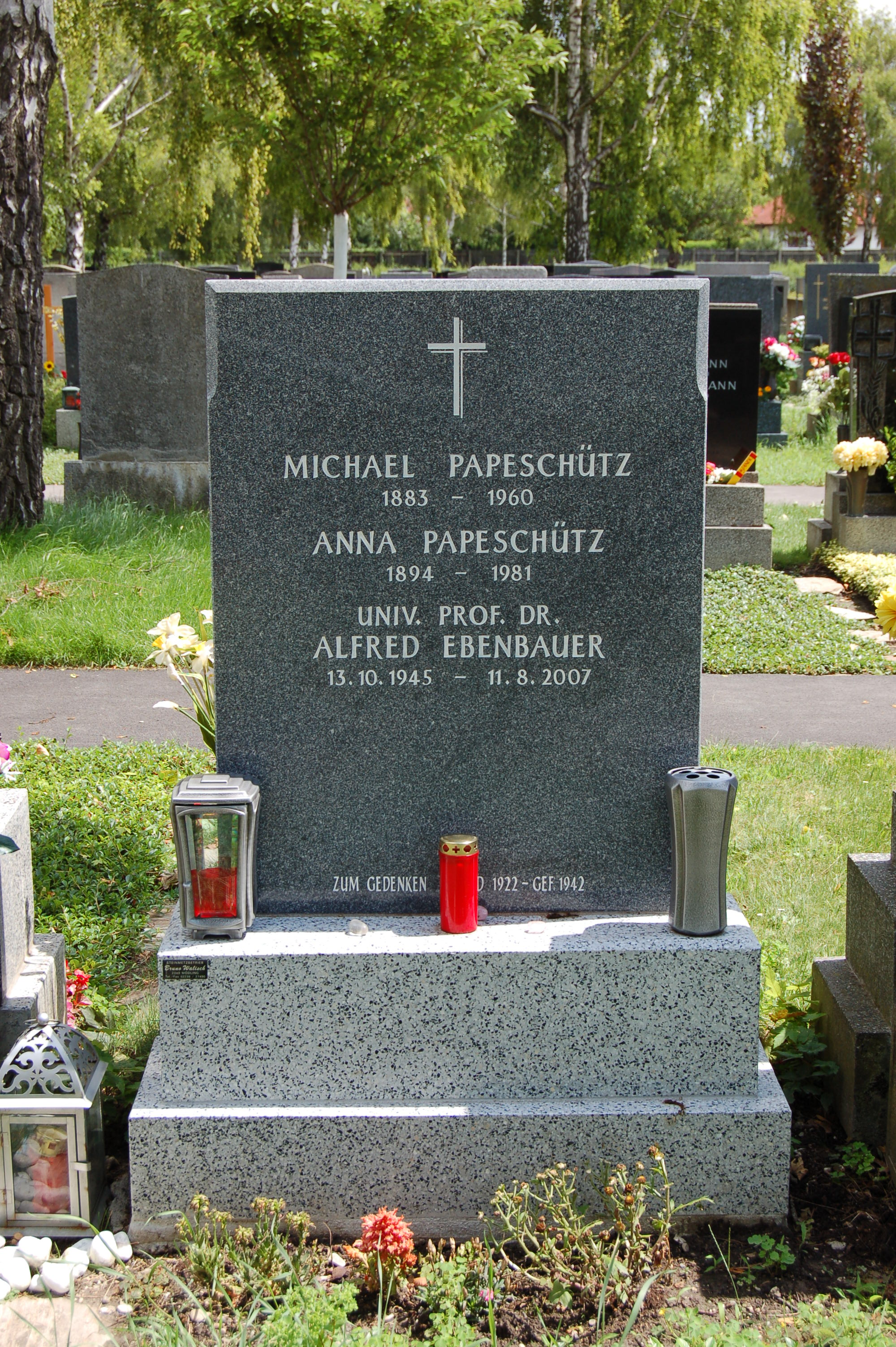 Stammersdorfer Zentralfriedhof, ehrenhalber gewidmetes Grab von Alfred Ebenbauer, Germanist und Literaturwissenschaftler